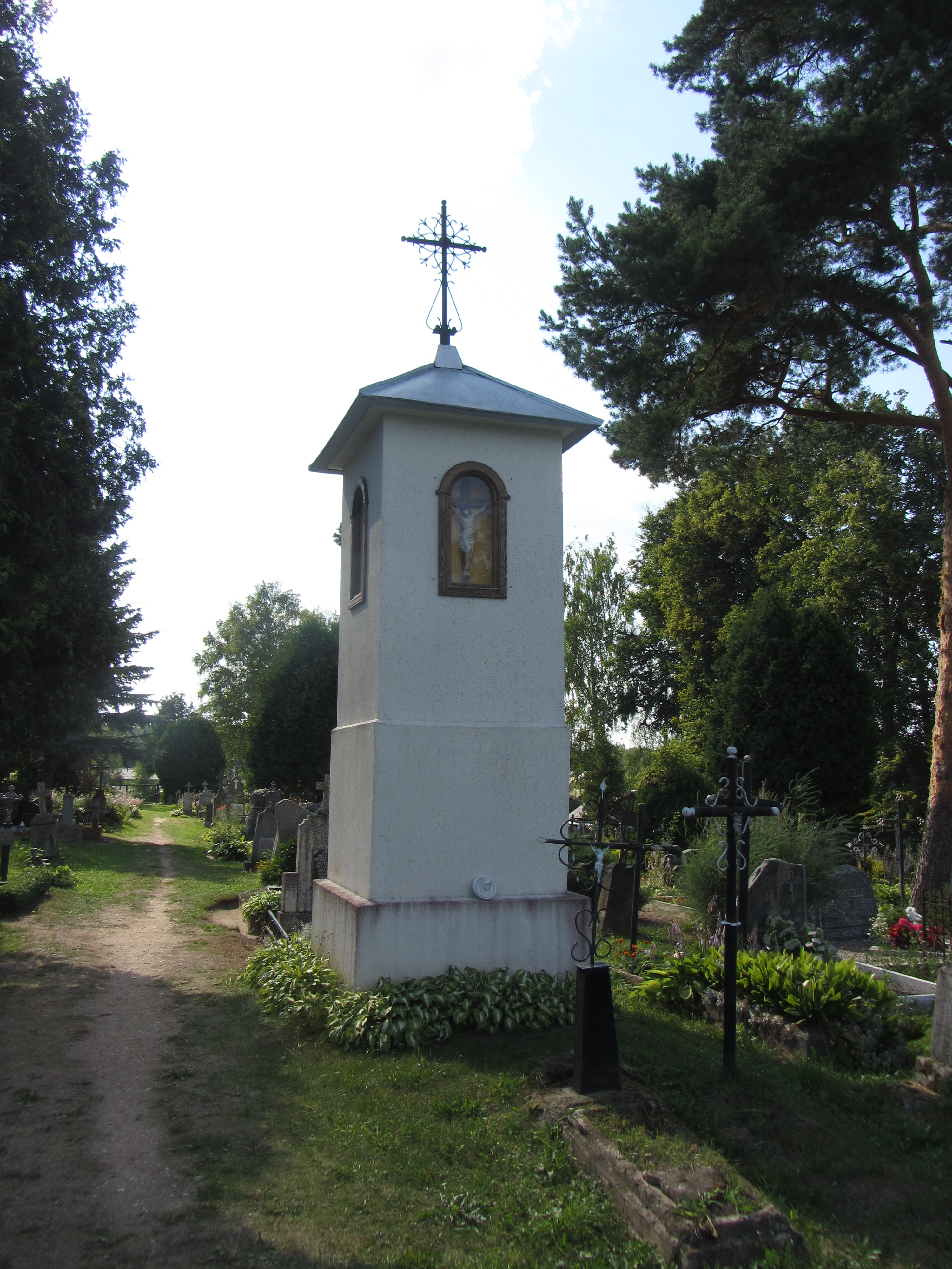 Tverečius 30163, Lithuania